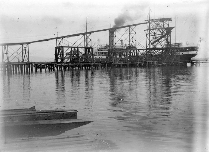 Negatief. Een kolentip bij Poeloe Laoet in Zuidoost-Borneo